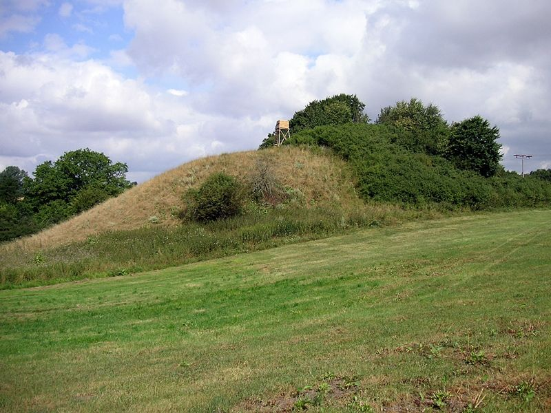 Slawischer Burgwall Ganschendorf in der Gemeinde Sarow im Landkreis Demmin, Mecklenburg-Vorpommern